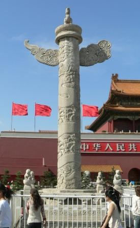 天安门前西侧华表 拍摄